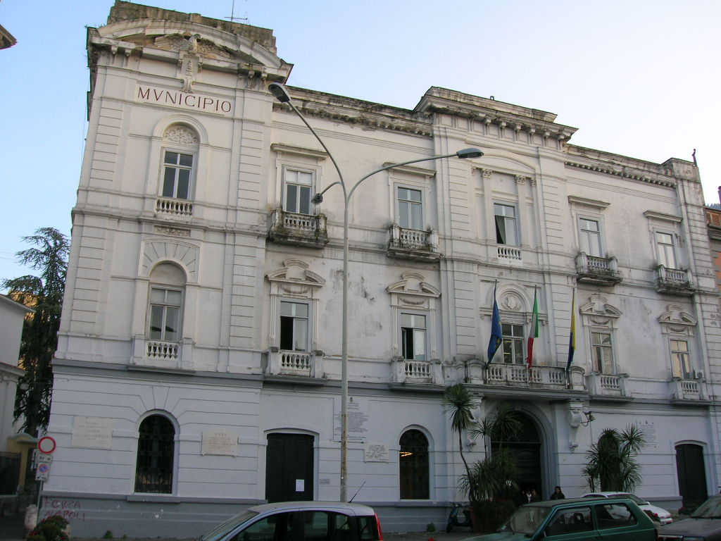 Il palazzo Farnese, attuale municipio, di Castellammare di Stabia